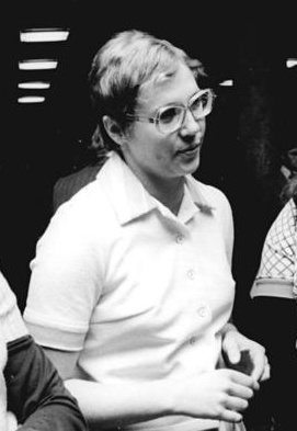 Anne-Katrin Leucht